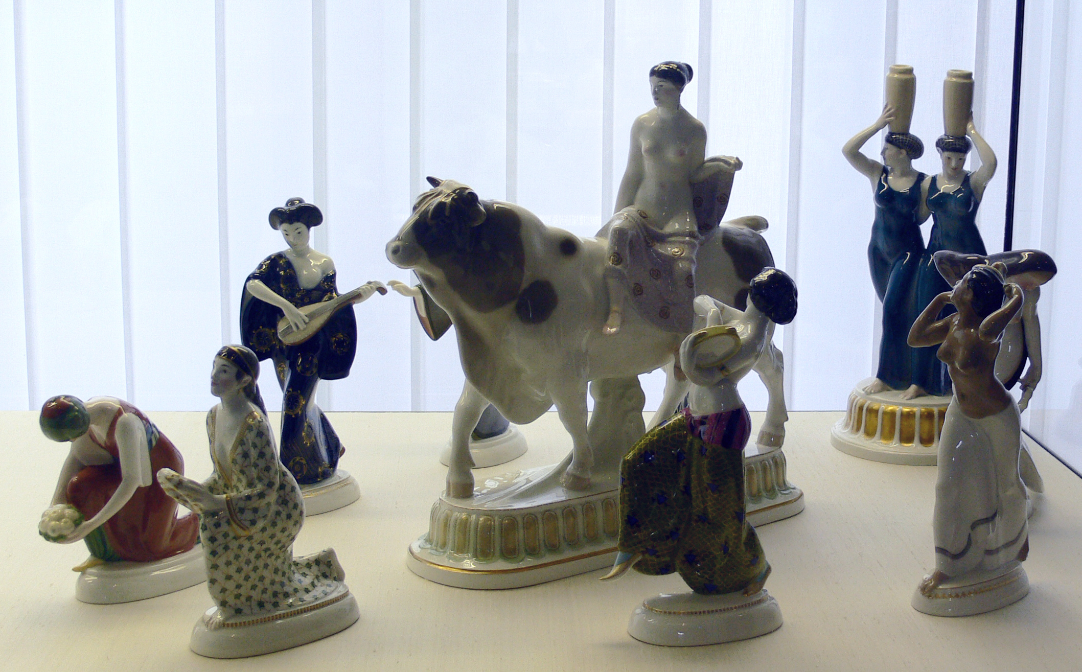 „Hochzeitszug“ von Adolph Amberg, Königliche Porzellan-Manufaktur, Berlin nach 1911 Kunstgewerbemuseum Berlin